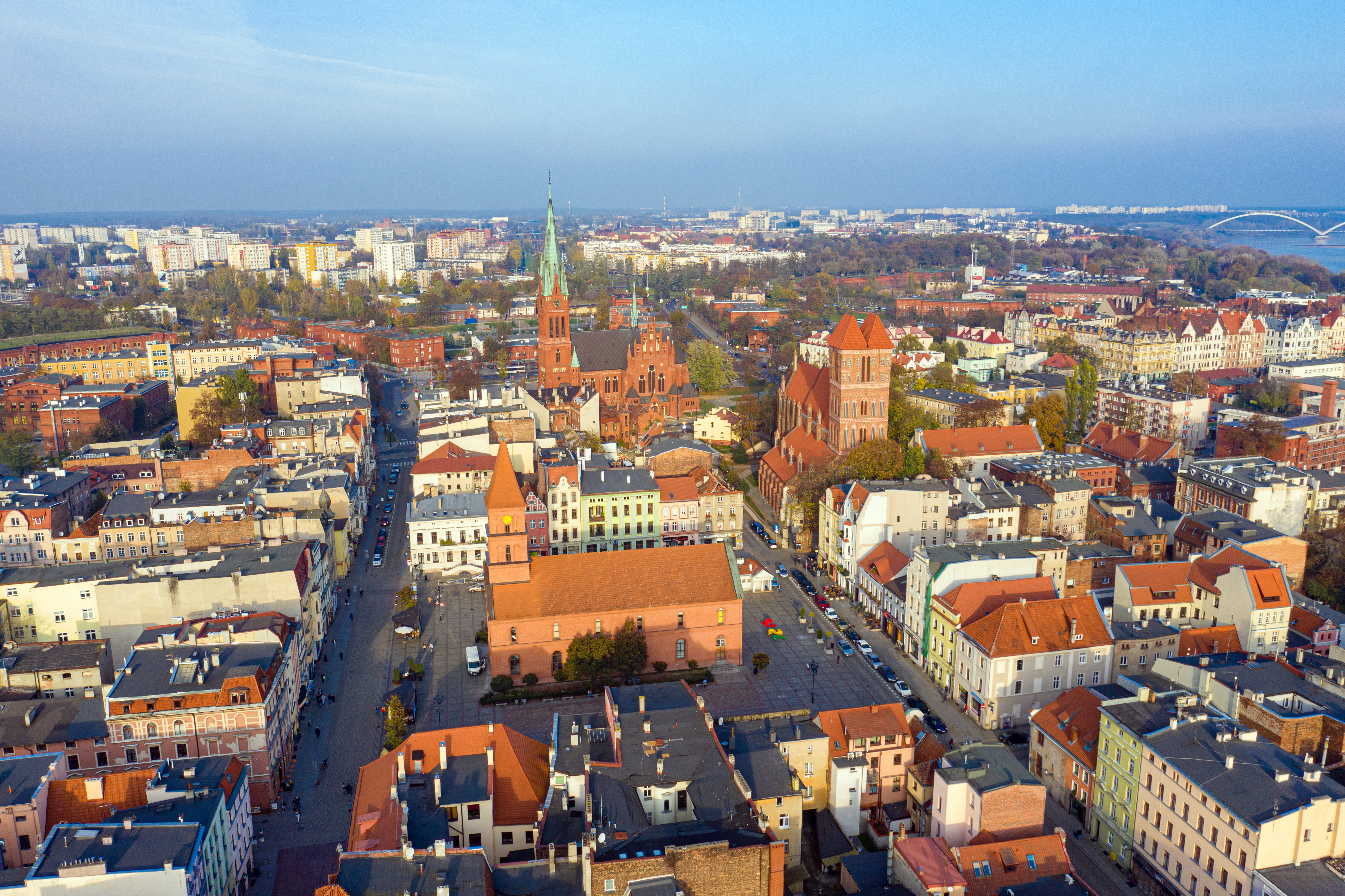 Blick über die Blick über Toruńer Innenstadt, Okt. 2019